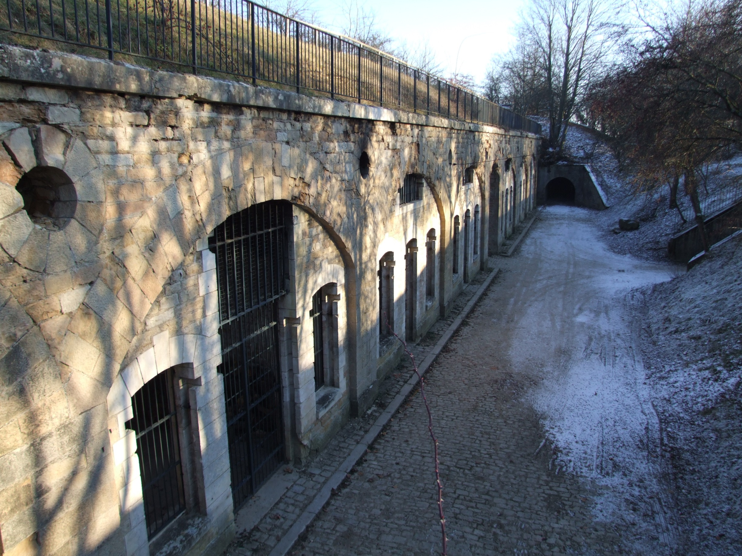 Redoute de Saint-Apollinaire, le casernement. Saint-Apollinaire, Côte-d'Or, Bourgogne, FRANCE